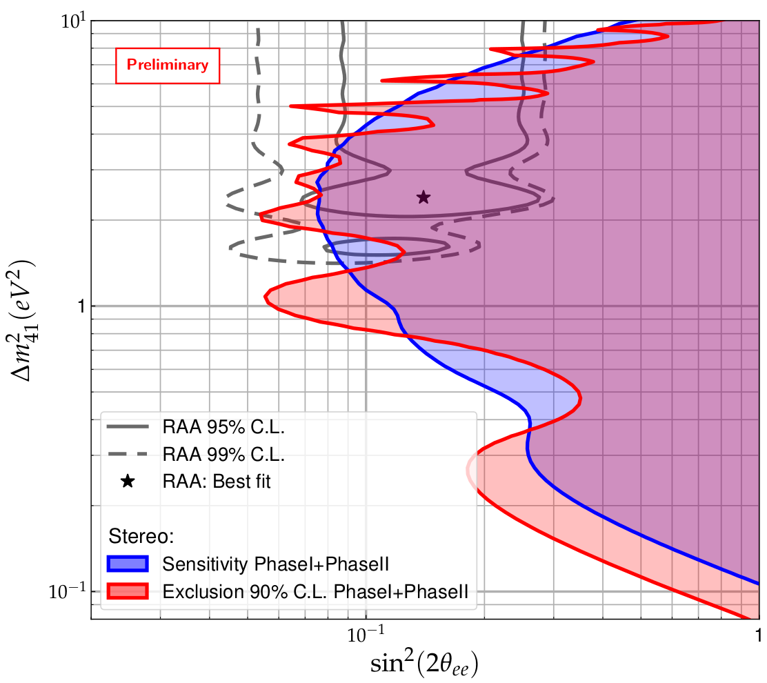 Ergebnisse des STEREO Experiments (Stand Mai 2019) zur Untersuchung der möglichen Existenz leichter steriler Neutrinos als Erklärung der RAA. Der blaue Bereich zeigt die erwartete Parametersensitivität, die unter der Erwartung, dass keine zusätzliche Neutrinoart existiert, erreicht werden sollte. Der rote Bereich zeigt den aufgrund der realen Messung ausgeschlossenen Parameterbereich. Er fluktuiert aufgrund statistischer Schwankungen um den blauen Erwartungsbereich. Die schwarzen Linien zeigen den von der RAA favorisierten Parameterbereich, der bereits zu einem großen Teil ausgeschlossen ist.